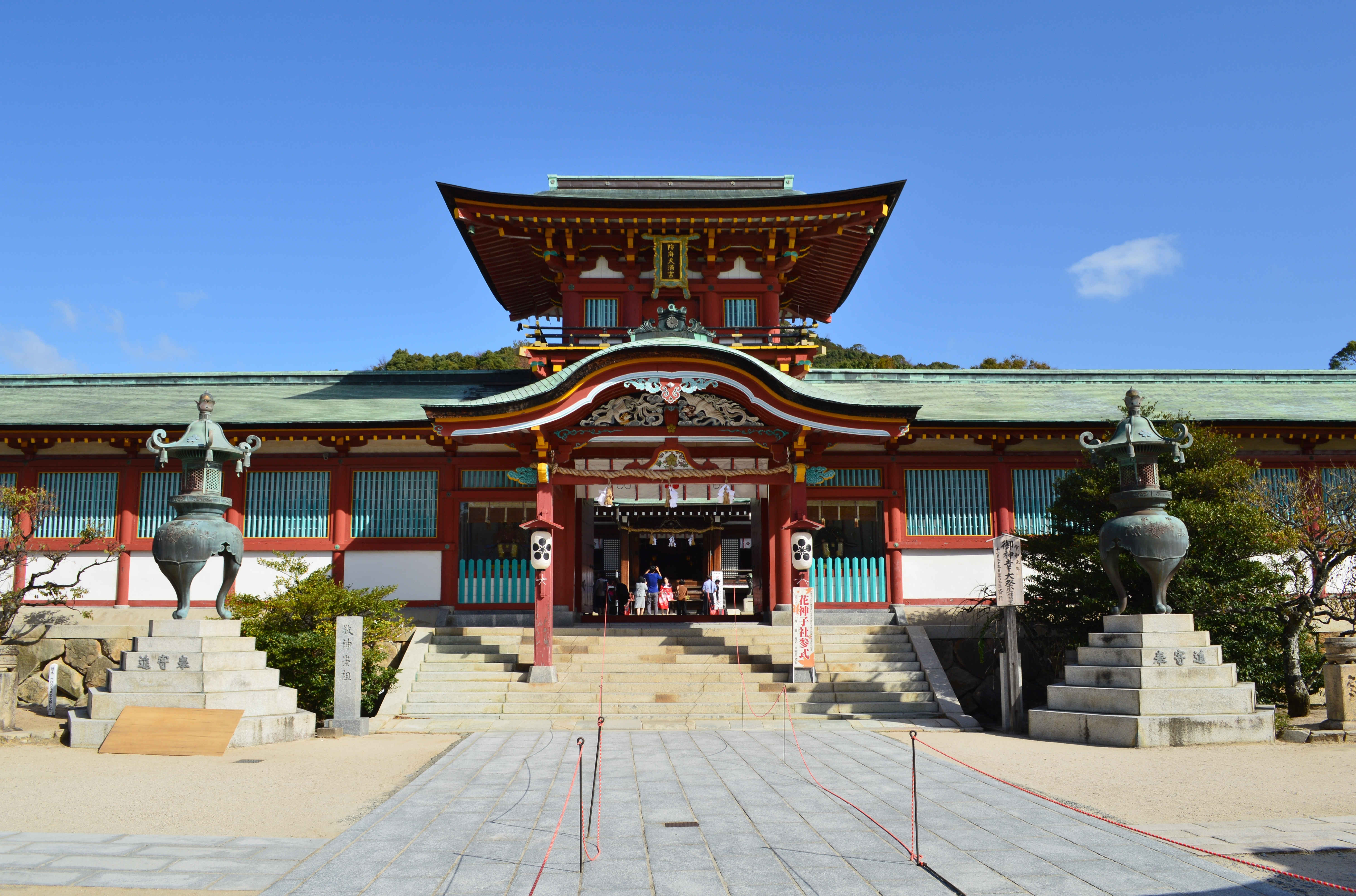 防府天満宮 楼門